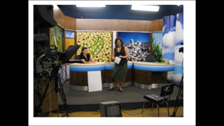 Trabajo en cambio